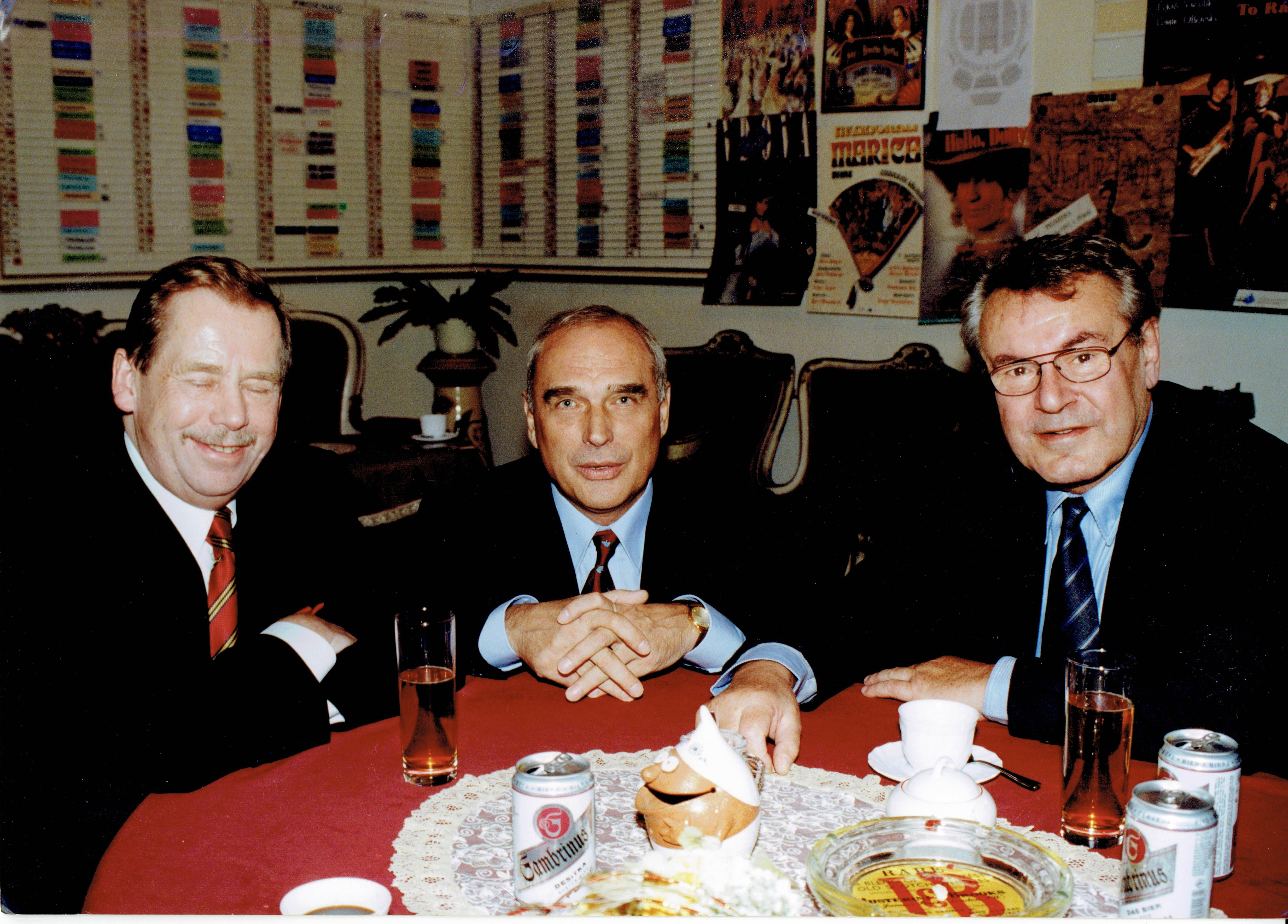 Ladislav Županič (uprostřed) s Václavem Havlem a Milošem Formanem v Hudebním divadle v Karlíně na setkání při příležitosti 50. výročí vzniku divadla Semafor.